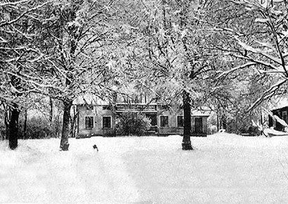 Kydingeholms gård på vintern